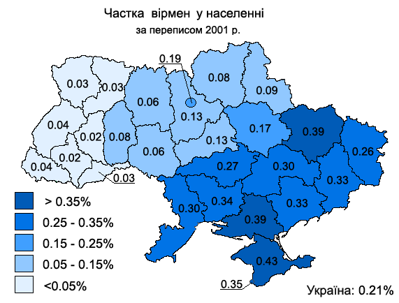 Armenians in Ukraine according to 2001 Census: Частка вірменів у населенні за переписом 2001 року